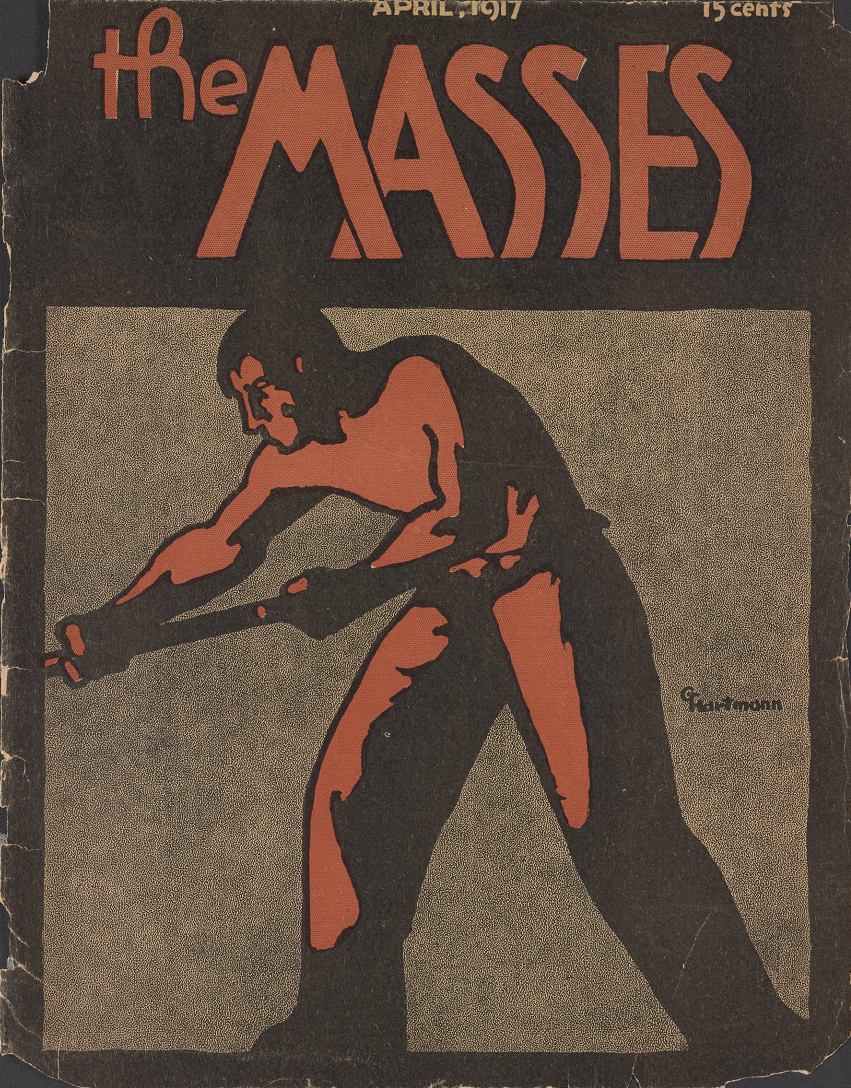 Portada del número de abril de 1917 de The Masses.